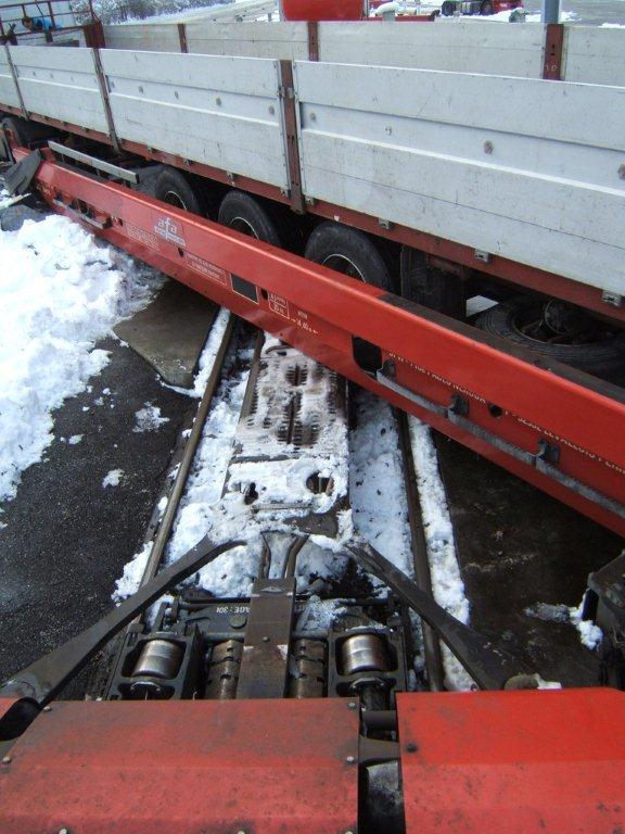 Système, train et wagon Modalohr, plateforme d'Aiton, Savoie, France